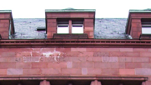 Universität Freiburg i. Br., Kollegiengebäude I